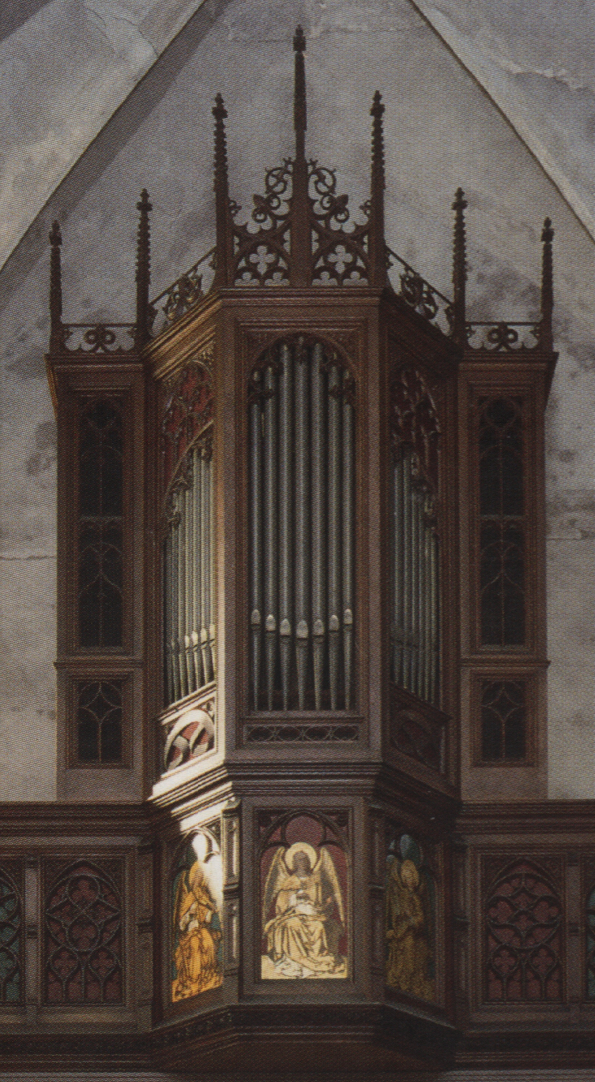 Orgelfront Maarschalkerweerdorgel H. Antonius Abt te Loo